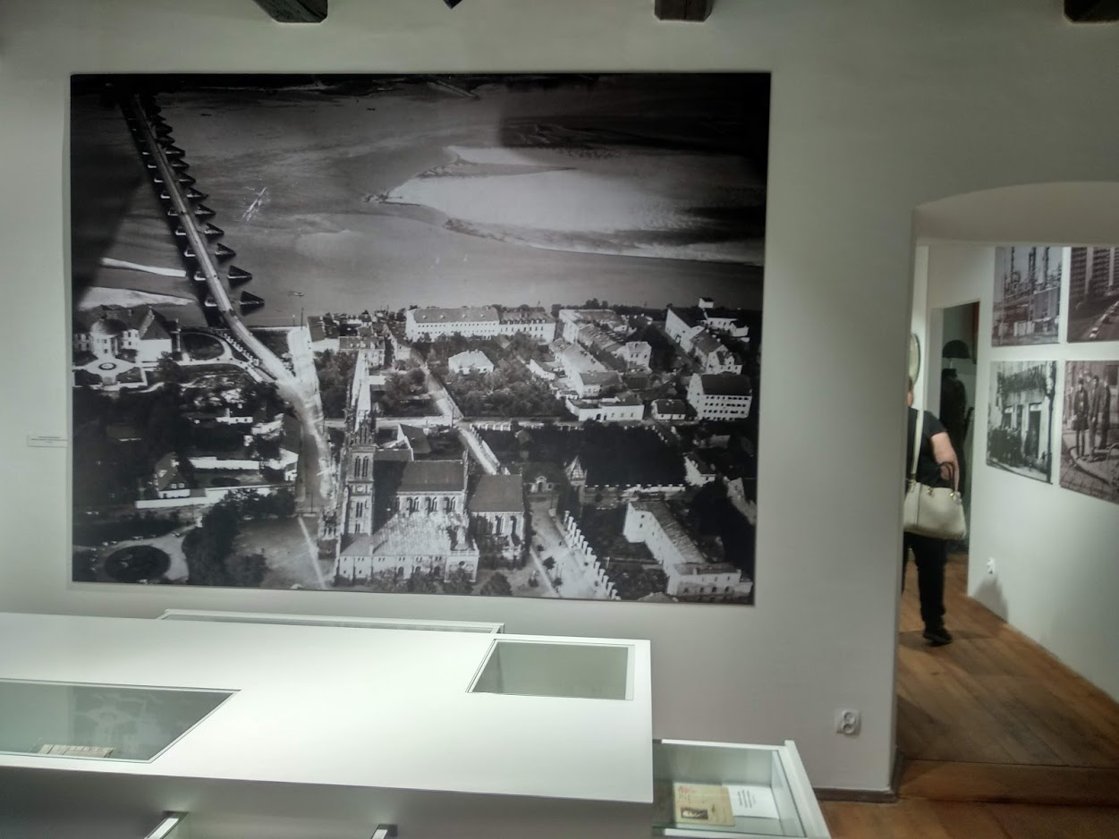 Muzeum Historii Włocławka (2019 r.)